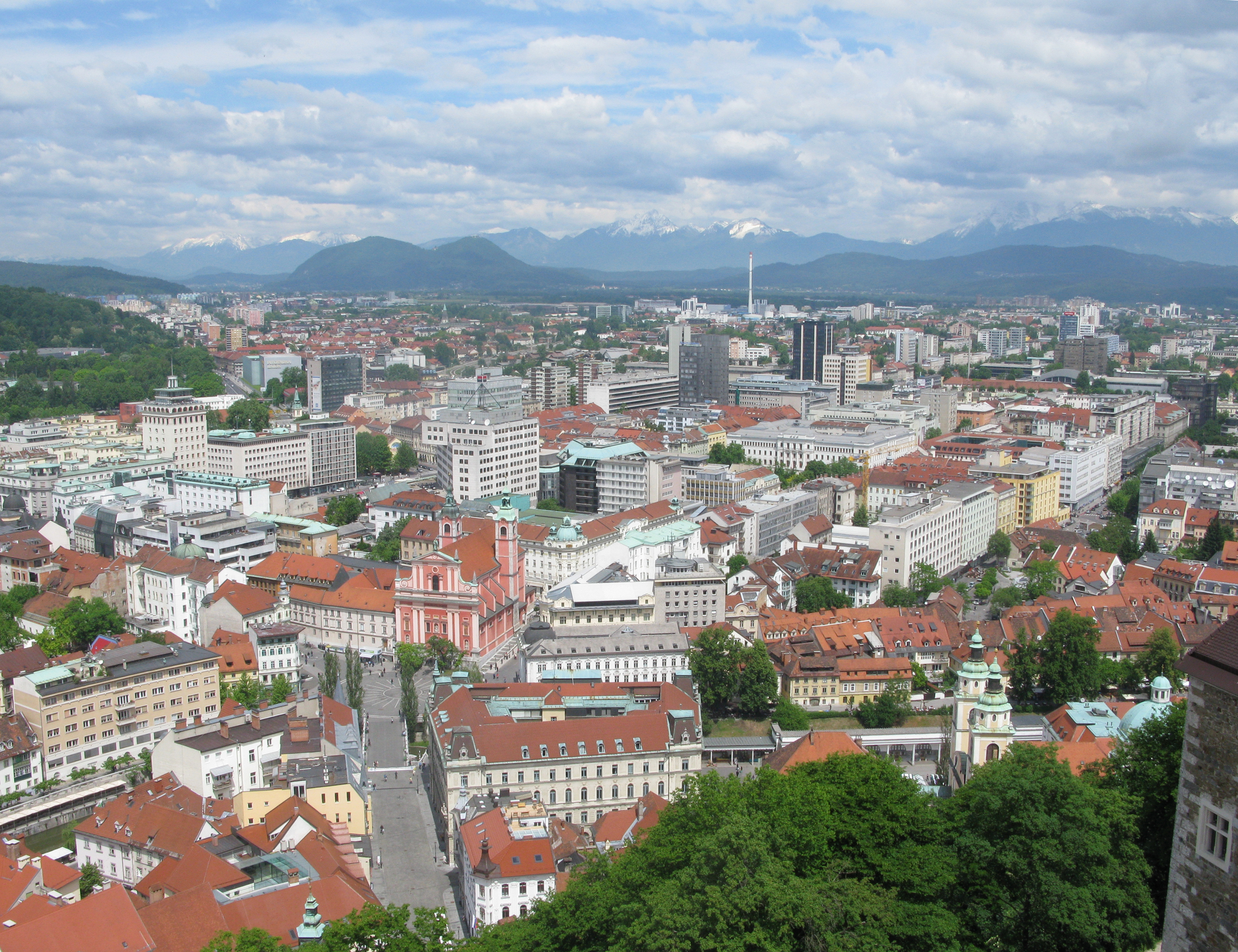 View from Ljubljana Castle